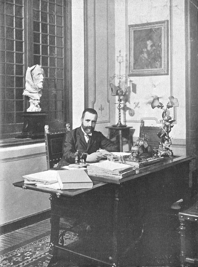 El señor Canalejas en un su gabinete de estudio. Fotografía de Christian Franzen.